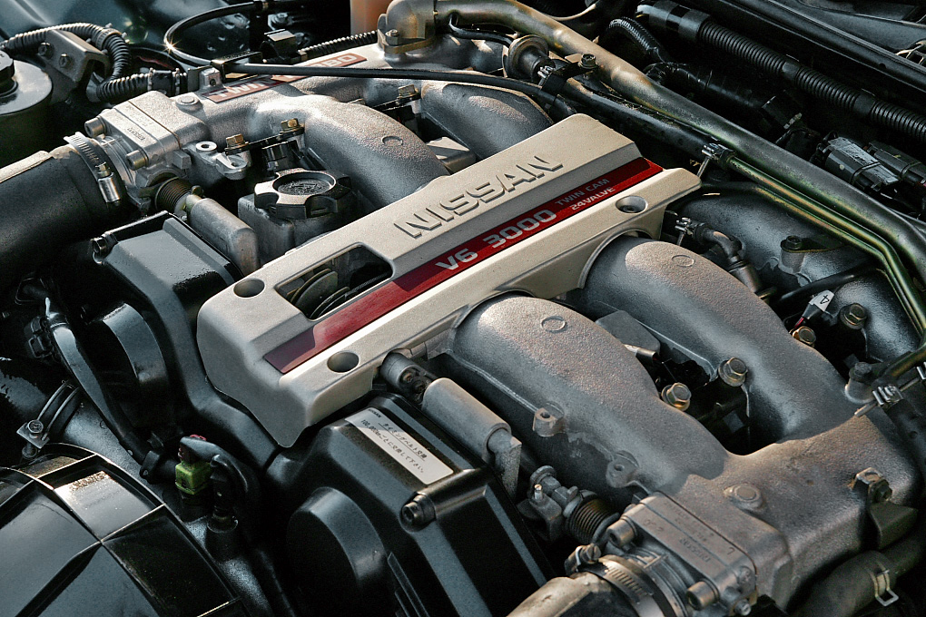 Nissan VG30DETT Engine